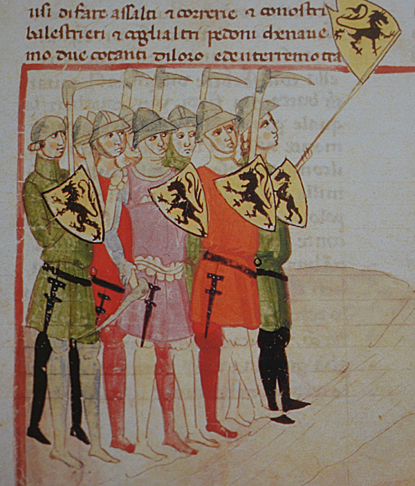 Battle of the Golden Spurs